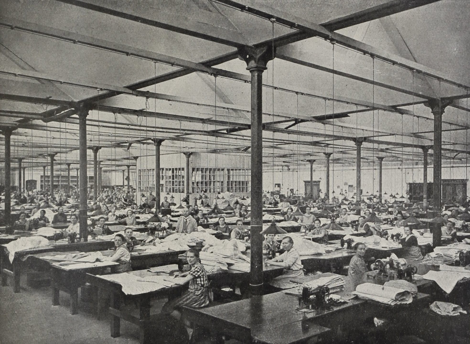 ZPB "Frotex" w Prudniku (dawniej "S. Fränkel"), 1932.